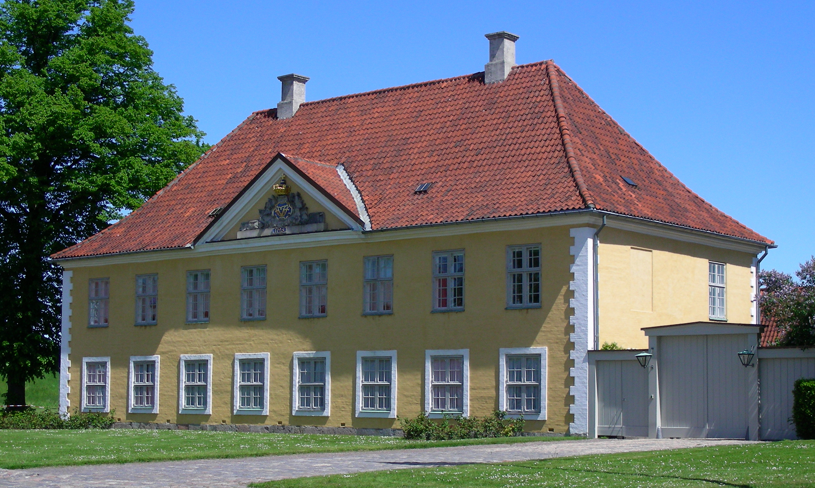 The Citadel of Copenhagen aka Kastellet. Kommandantboligen